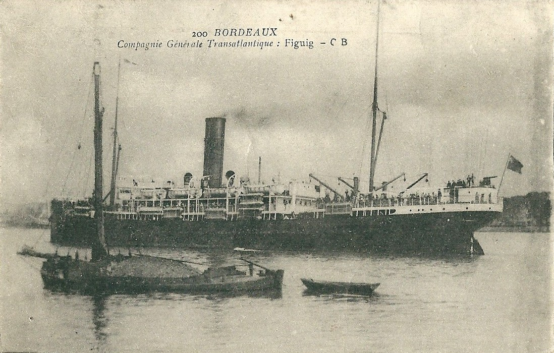 Le FIGUIG, paquebot de la Compagnie Générale Transatlantique - début XXe siècle